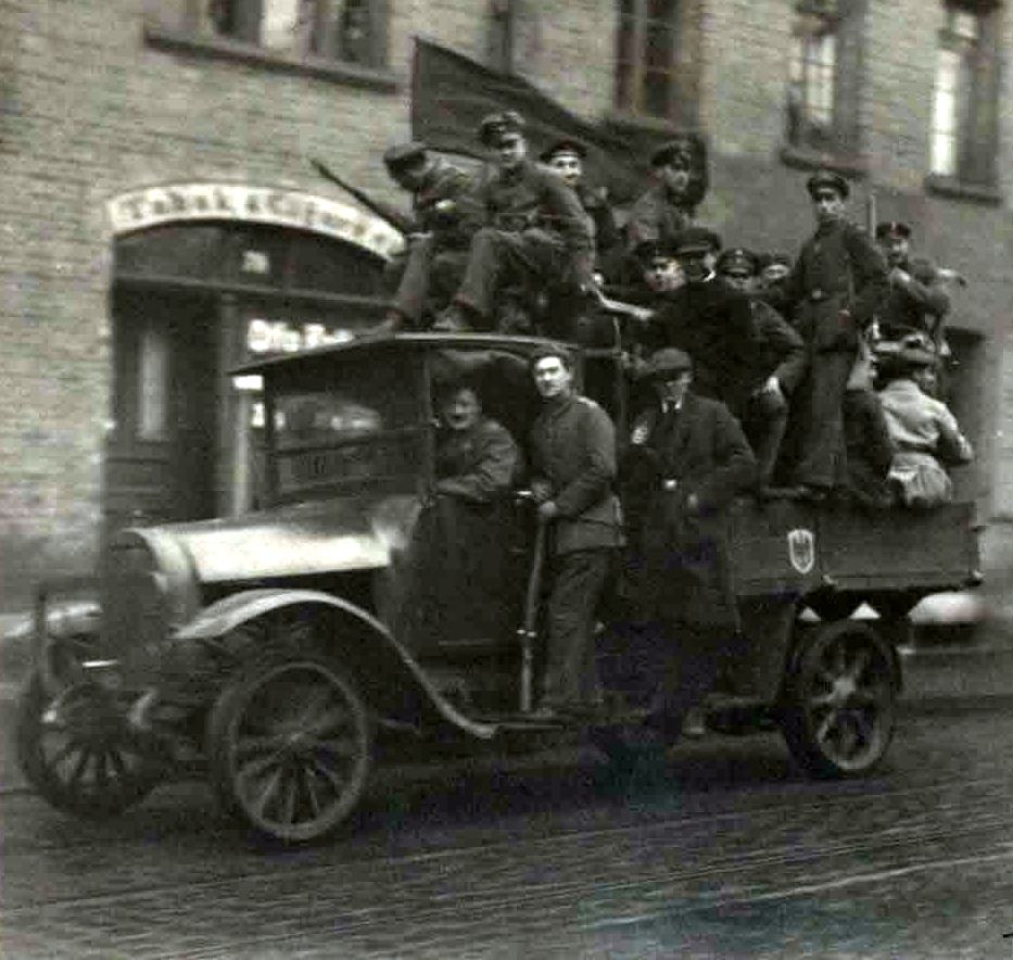 Braunschweig, Erster Weltkrieg & Novemberrevolution in Braunschweig: Revolutionstruppen auf einem Lkw in der Stadt, 1919.